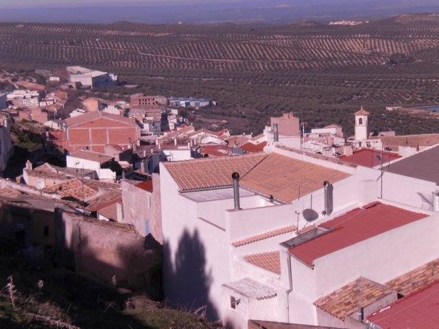 jimena jaen